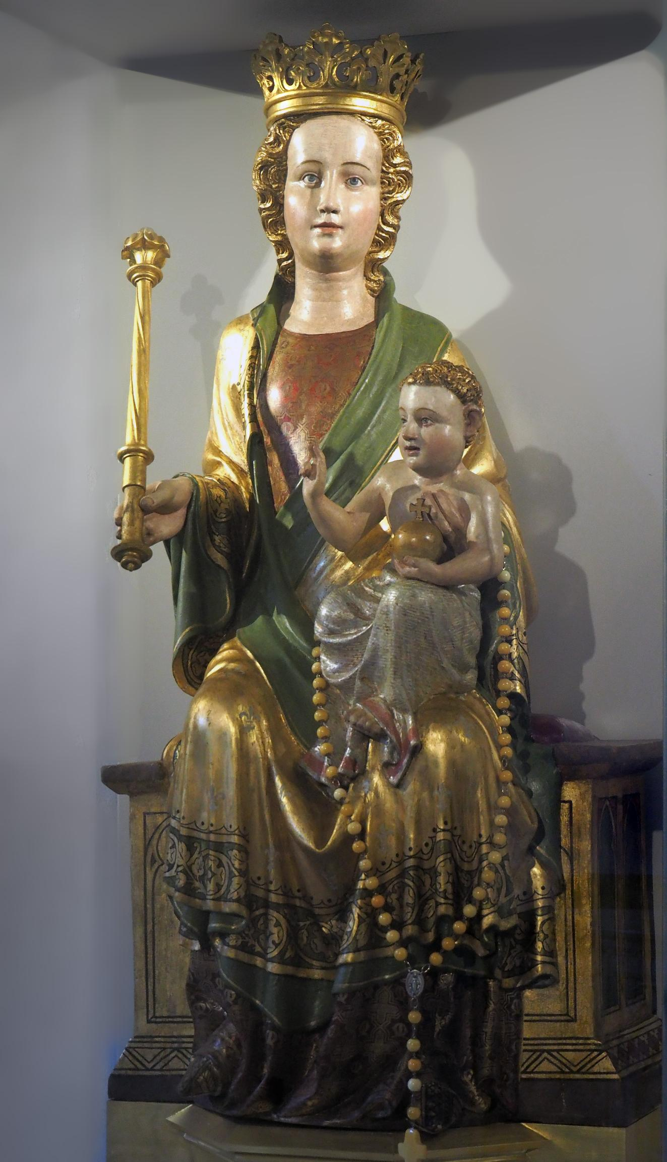 Wipperfürth (NRW),Kirche St. Nikolaus, Marienfigur, Foto: Juli 2015